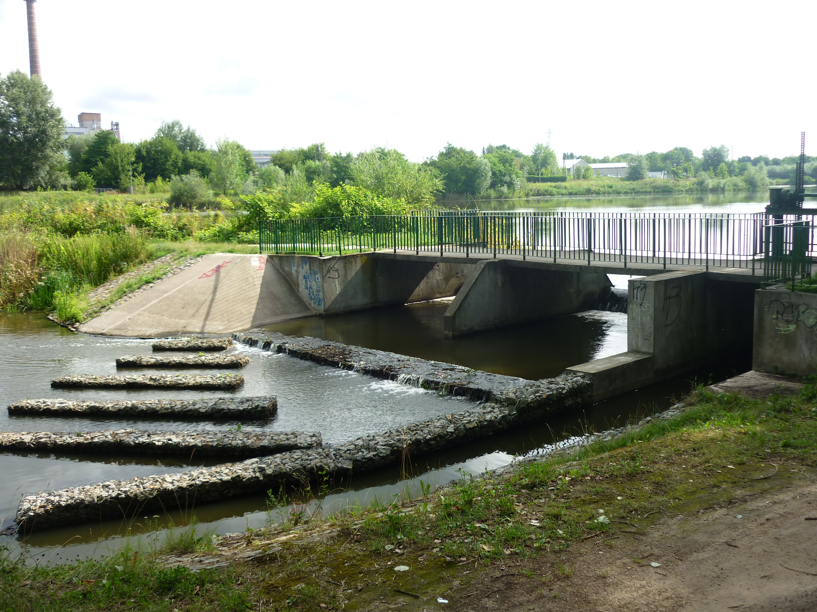 tama pomiędzy Młyńskim Stawem a Stawem Antoninek od strony Młyńskiego Stawu